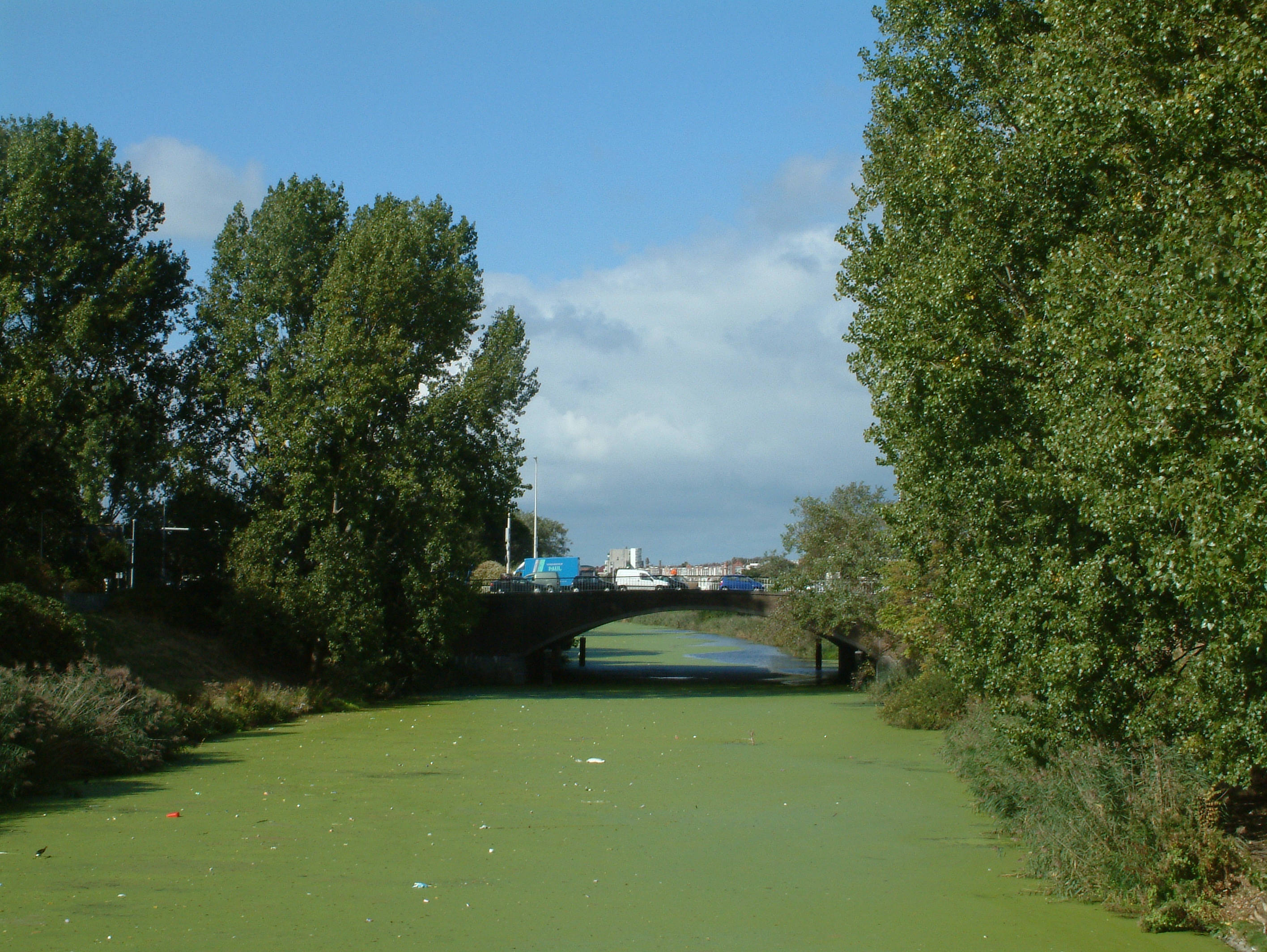 Brug in Den Haag